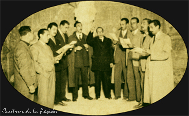 Dirigidos por Monserrate Moreno